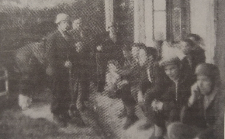 Fotografia wykonana w trakcie działań OP-23 na terenie powiatu sanockiego (Polska) w lipcu lub sierpniu 1944. Znajdują się na niej żołnierze pochodzący z OP-11. Na pierwszym planie Franciszek Czekaj trzyma odnaleziony w lesie sporych rozmiarów grzyb. Fotografia opublikowana przed 1994 rokiem ("Kryptonim San" 1992).